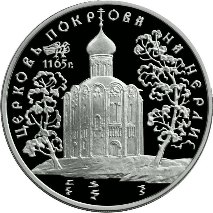 Монета Банка России — Серия: «Памятники архитектуры России», Церковь Покрова на Нерли, 3 рубля, реверс.